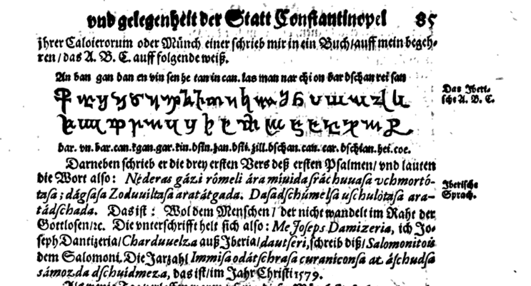 example of Georgian script in Salomon Schweigger book "Newe Reyßbeschreibung auß Teutschland nach Constantinopel